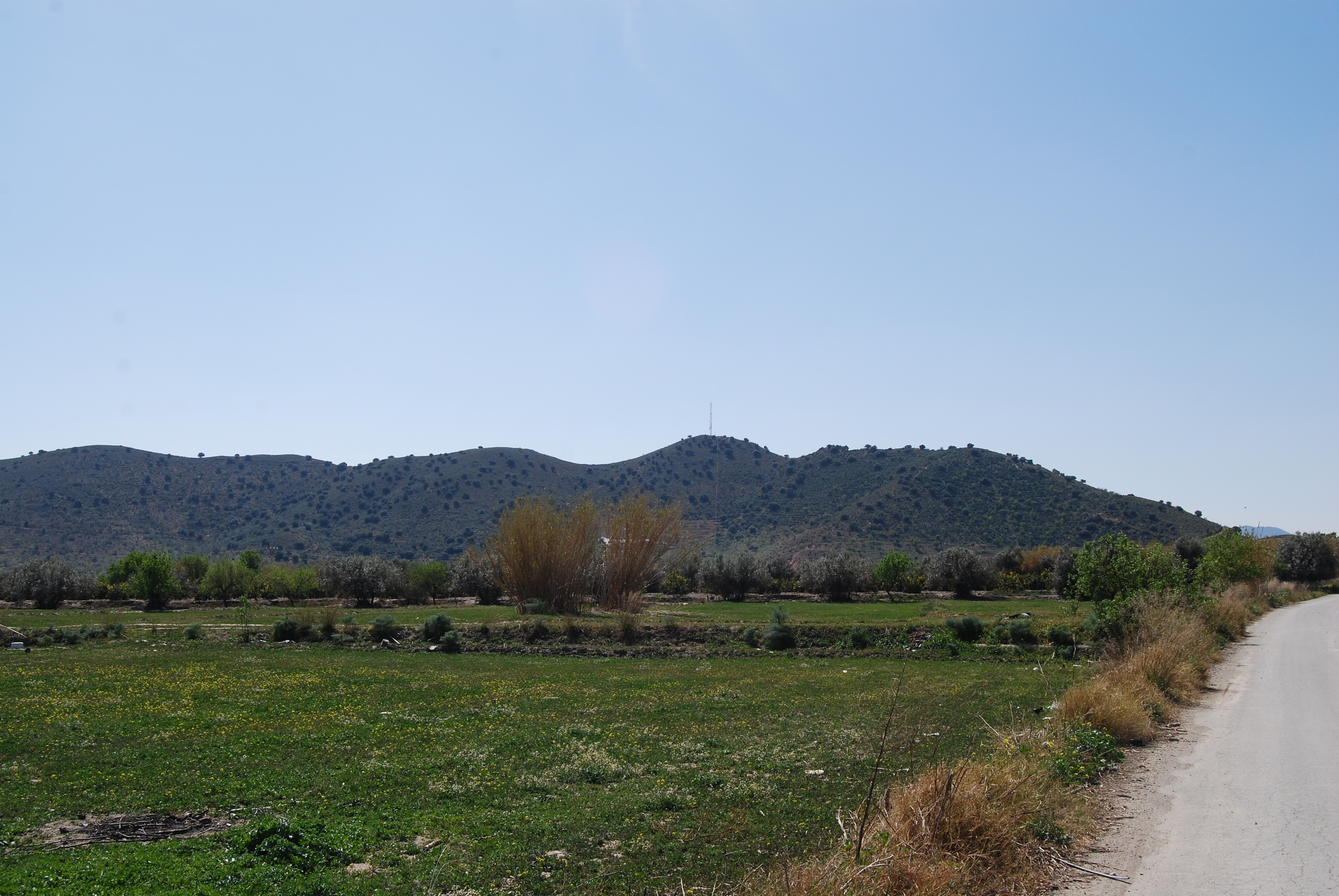 Al fondo Sierra de Enmedio desde los llanos del esparragal